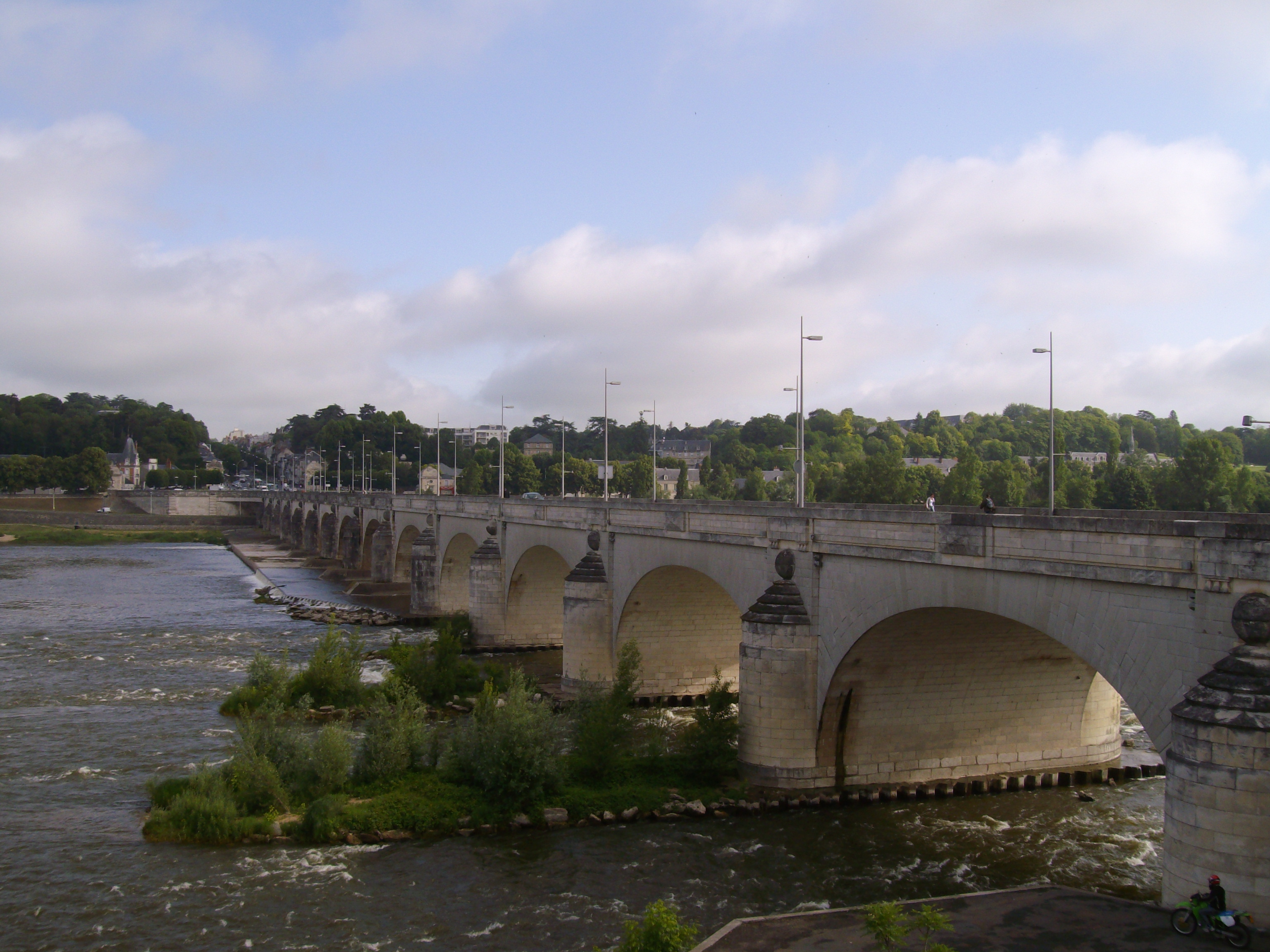 Pont Wilson enjambant la Loire à Tours.